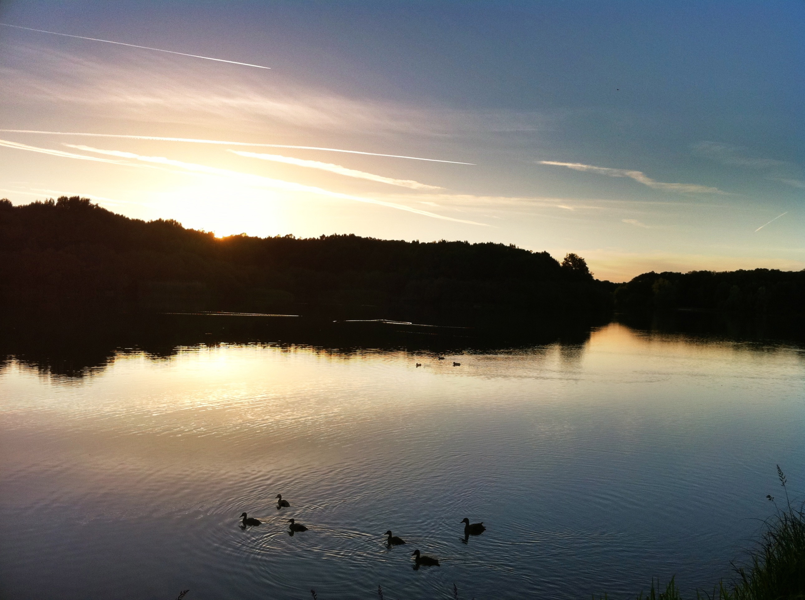 L'étang de la tour entre Rambouillet et vieille Eglise en Yvelines